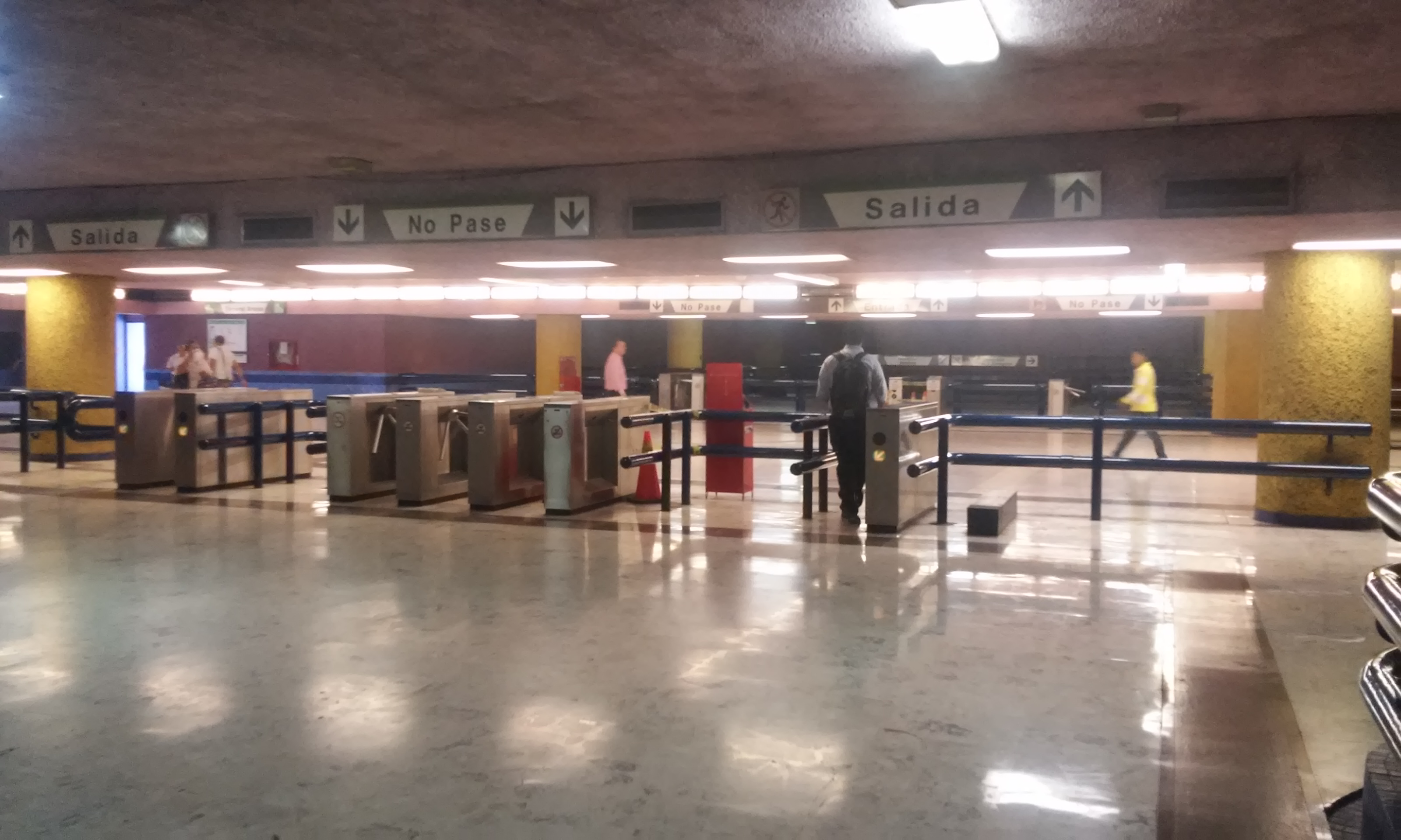 Área principal de la estación